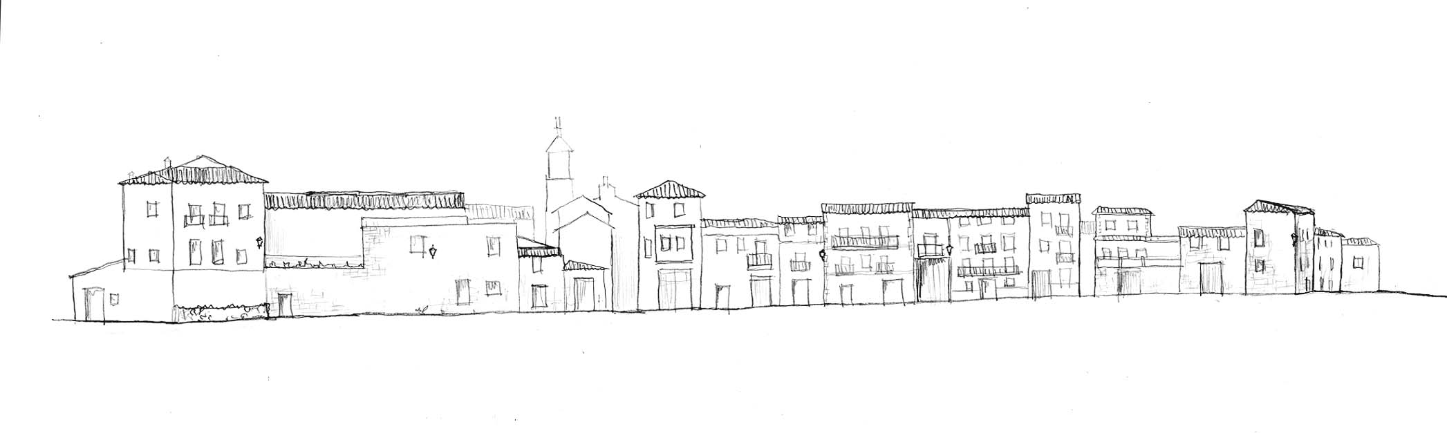 El cerco medieval de Zúñiga (Navarra), prácticamente perdido en su totalidad, mantiene su trazado por medio de las casas construidas sobre el propio cerco.